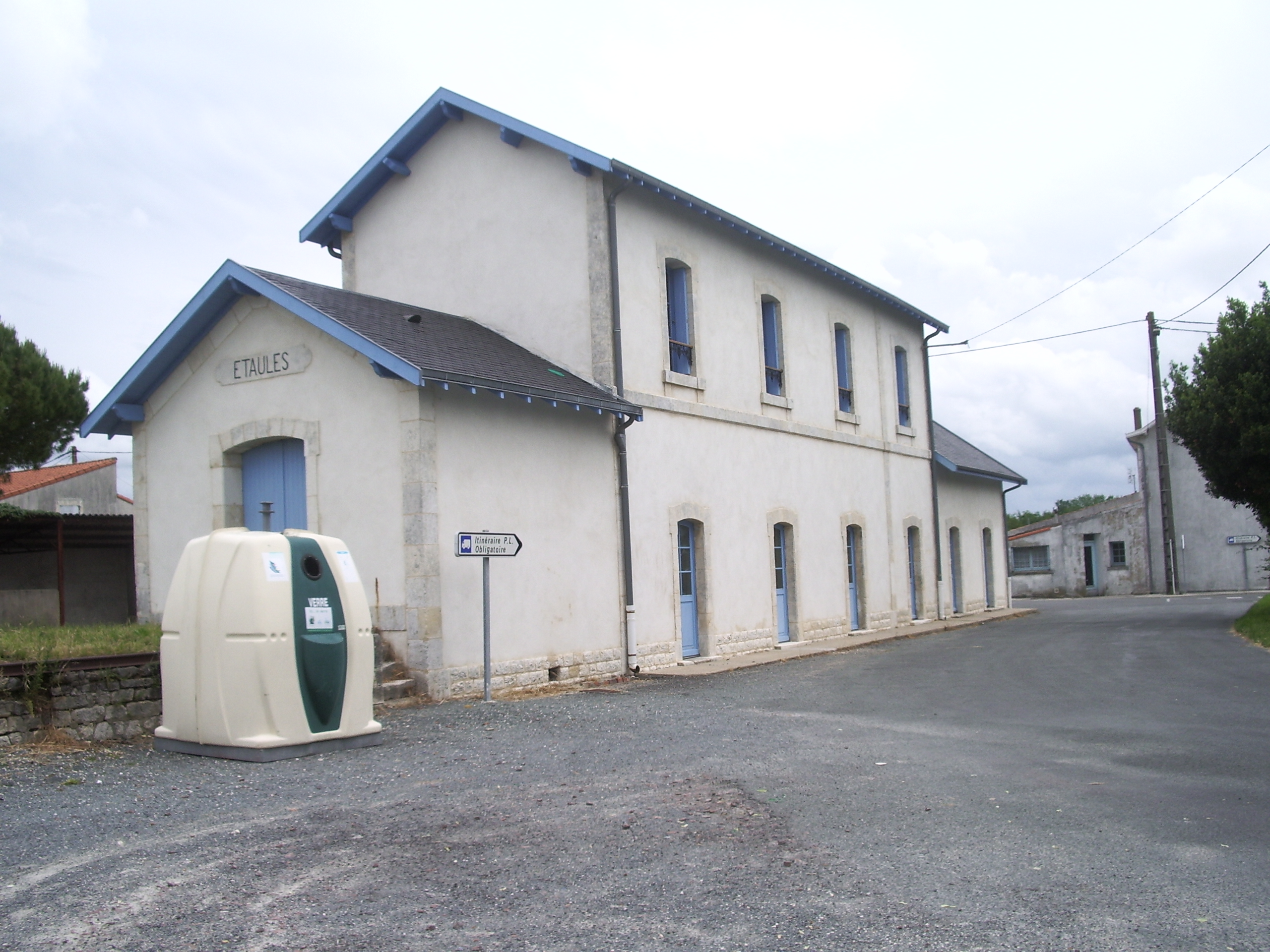 Gare d'Etaules, Charente-Maritime (train touristique de la Seudre)